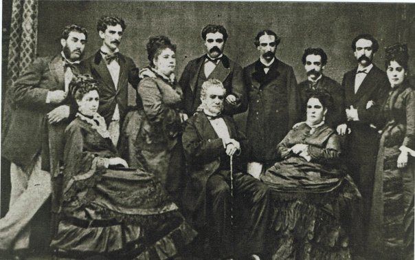 Antonio Salinas y Castañeda posando con su esposa Paula de Cossío y Centurión y sus nueve hijos, Celso Salinas y Cossío, Manuel Salinas y Cossío, Elena Salinas y Cossío, Paula Salinas y Cossío, Antonio Salinas y Cossío, Agripina Salinas y Cossío, Juan Salinas y Cossío, Santiago Salinas y Cossío, Teófilo Salinas y Cossío.